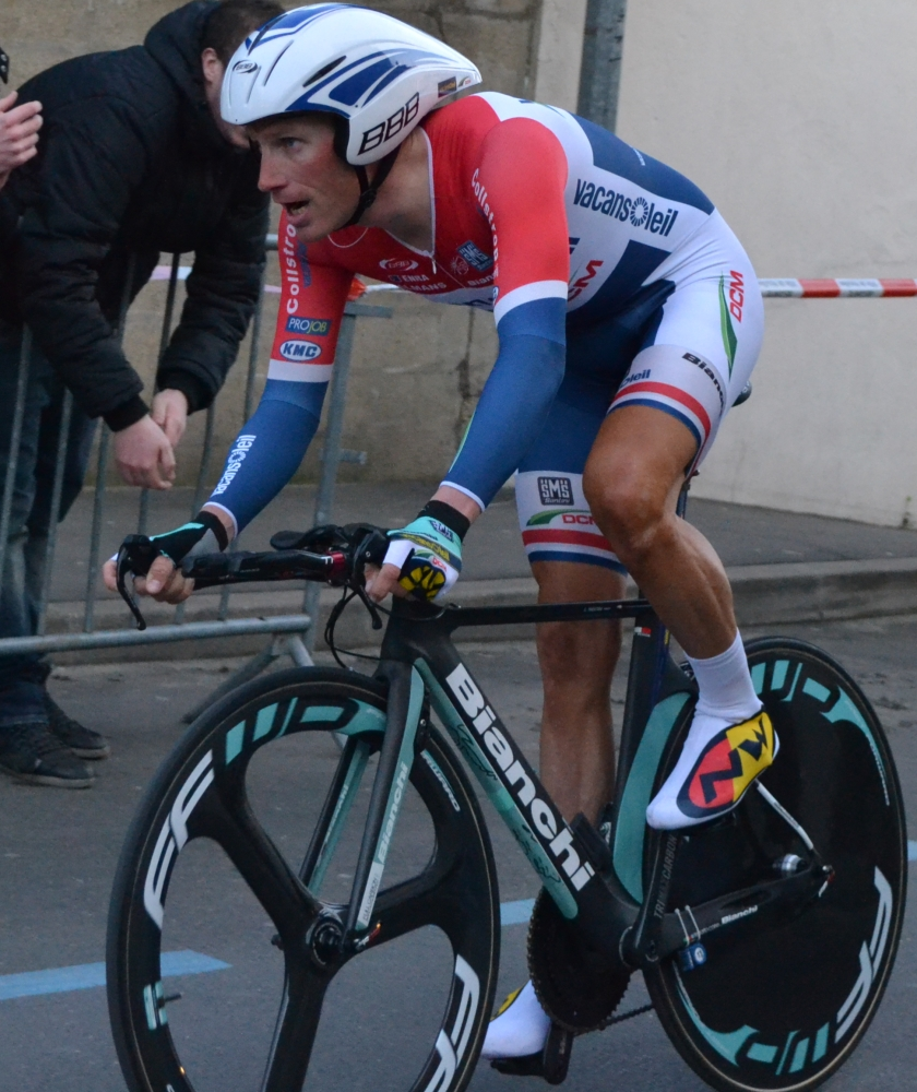 Lieuwe Westra, champion des Pays-Bas du chrono